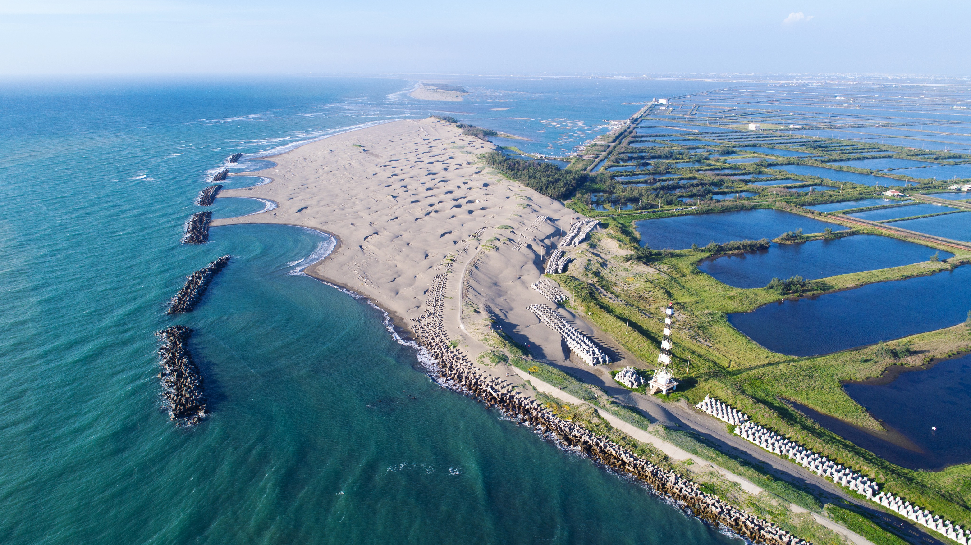 中文（台灣）: 位於七股區北堤堤坊的國聖燈塔